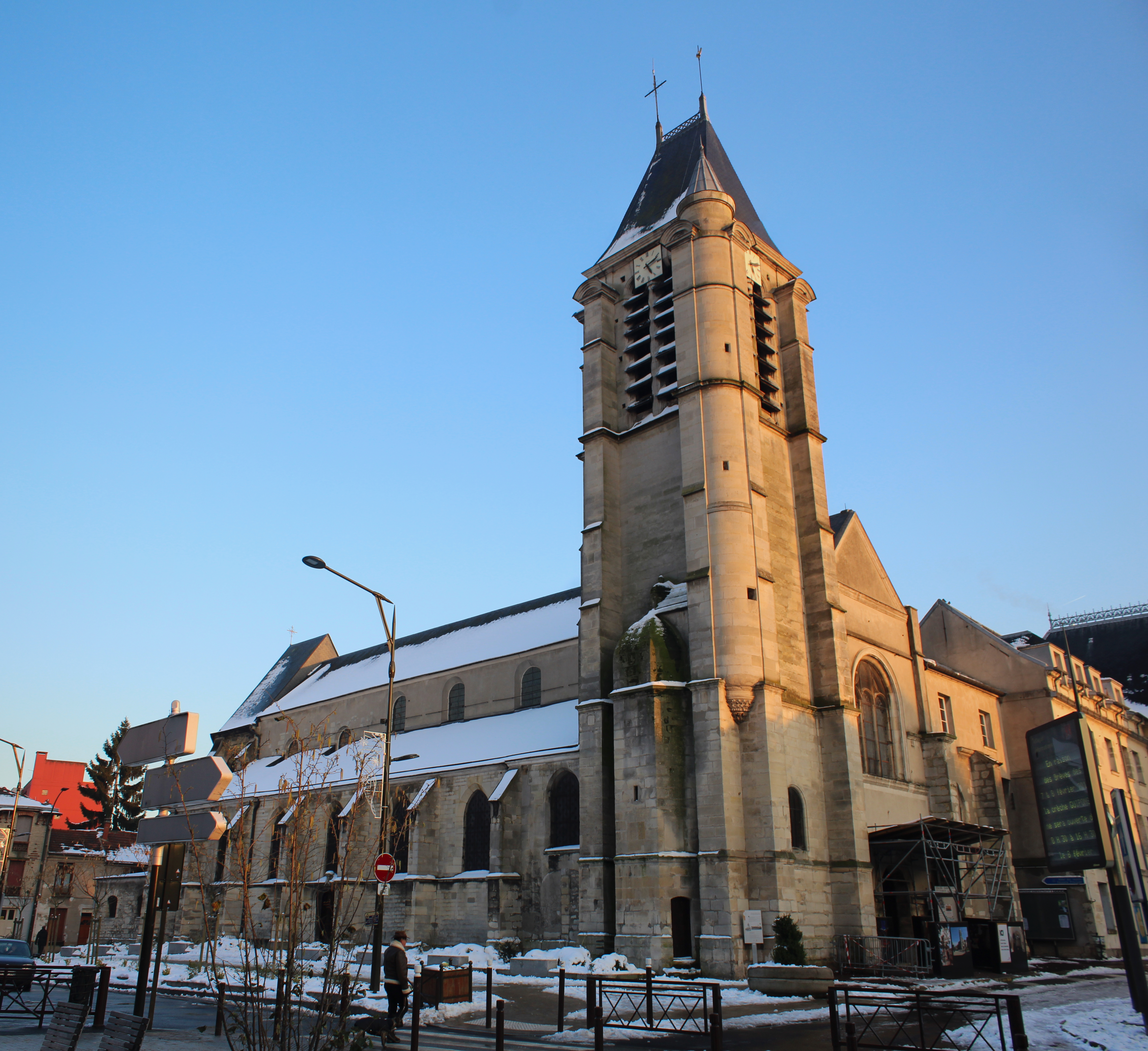 Église Saint-Cyr-Sainte-Julitte de Villejuif.